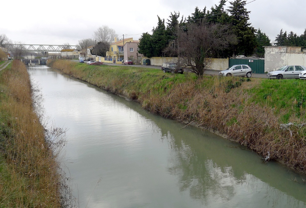 Village de Sylvéréal (commune de Vauvert, Gard, France)